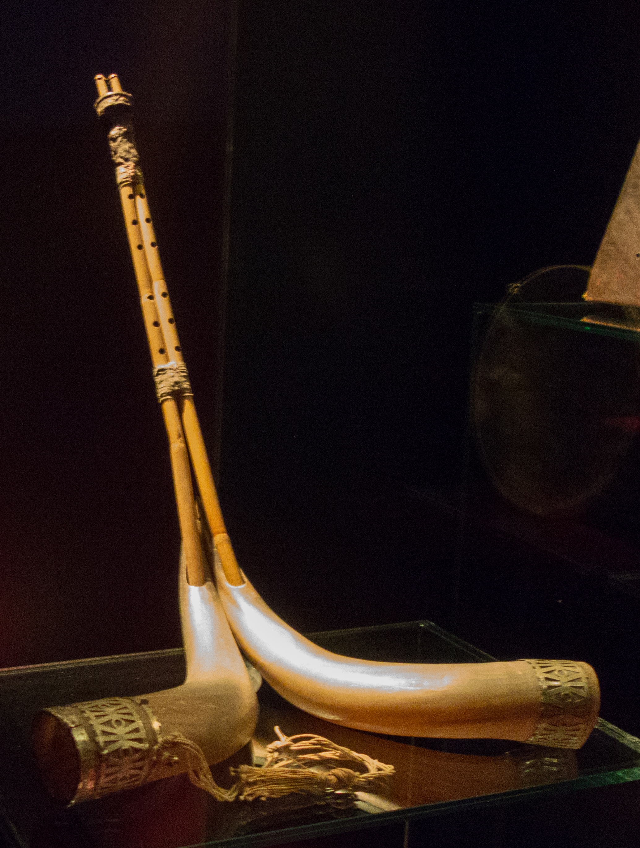 Zamar, Ric, Marroc, ca. 1900, MDMB 587, al fons del Museu de la Música de Barcelona